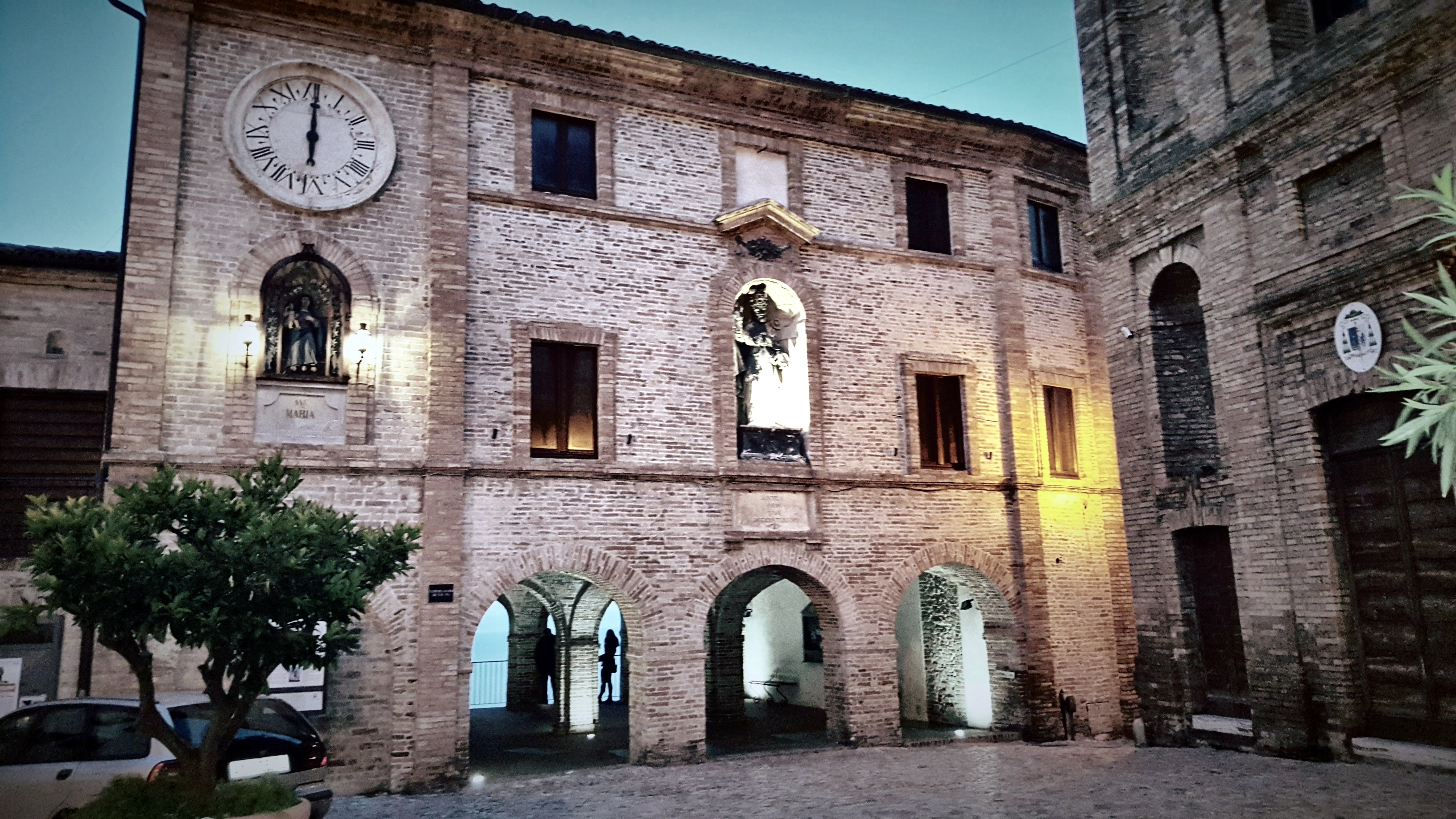 Piazza Peretti paese alto di Grottammare